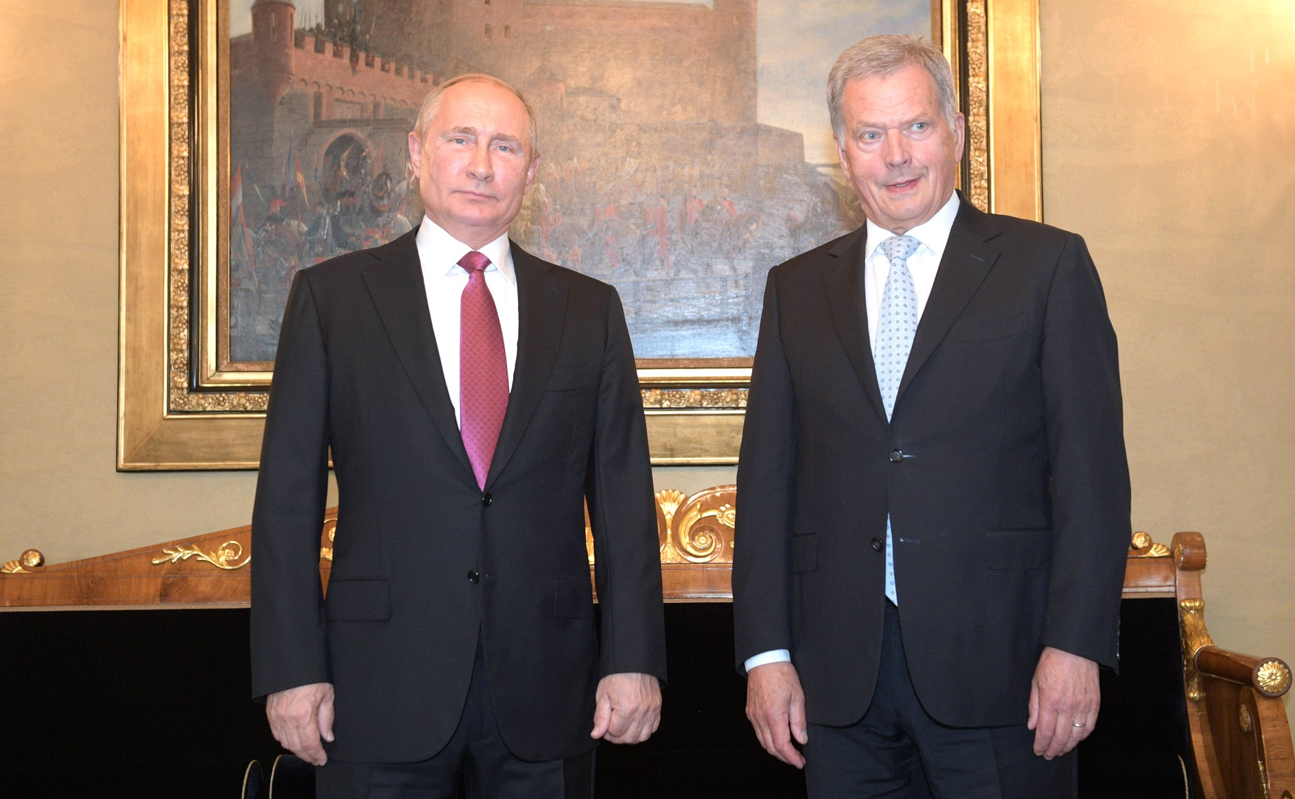 Российско-финляндские переговоры 21 августа 2019, Хельсинки